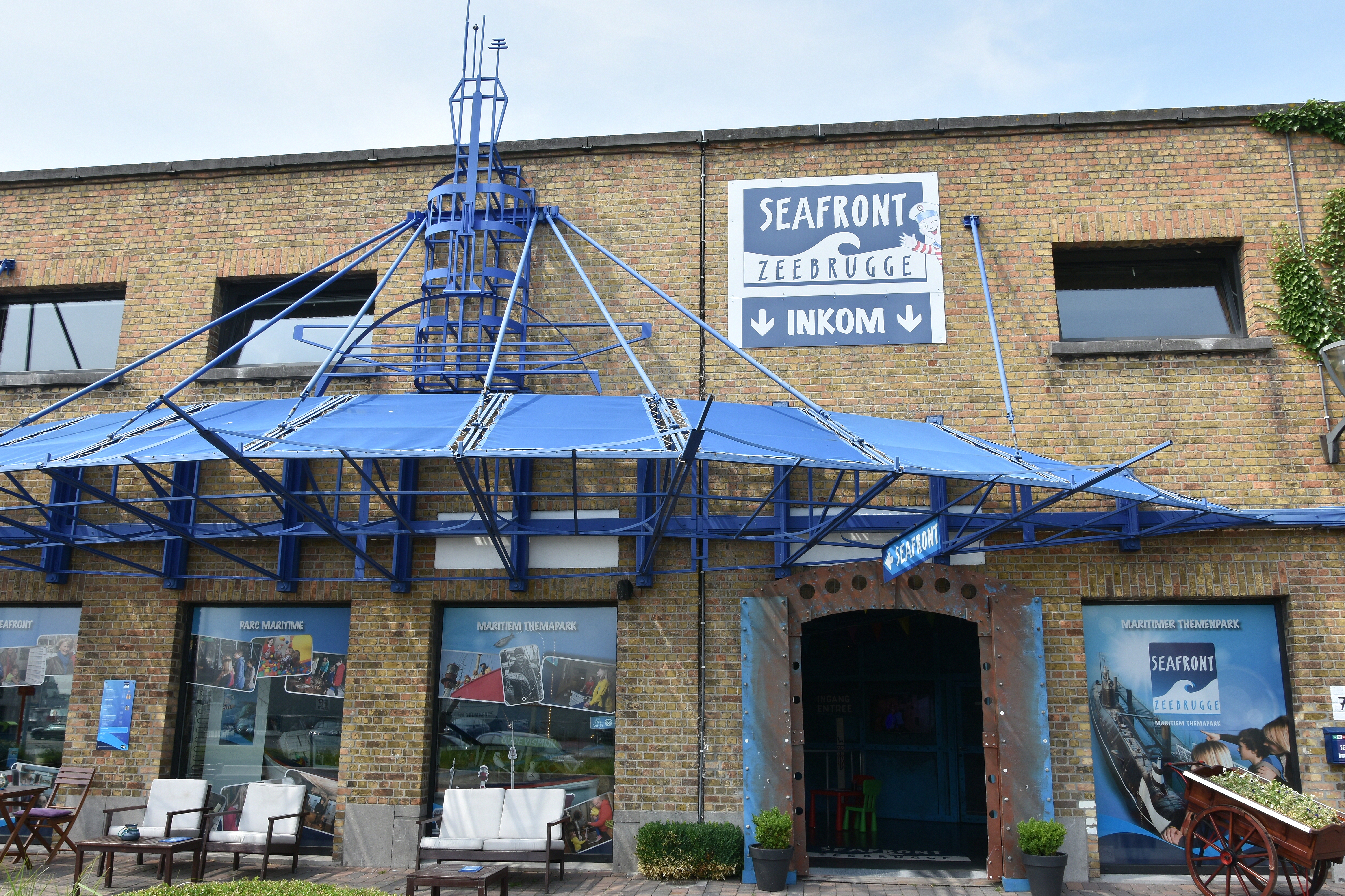 Seafront (Zeebrugge) 25-06-2019 15-22-36